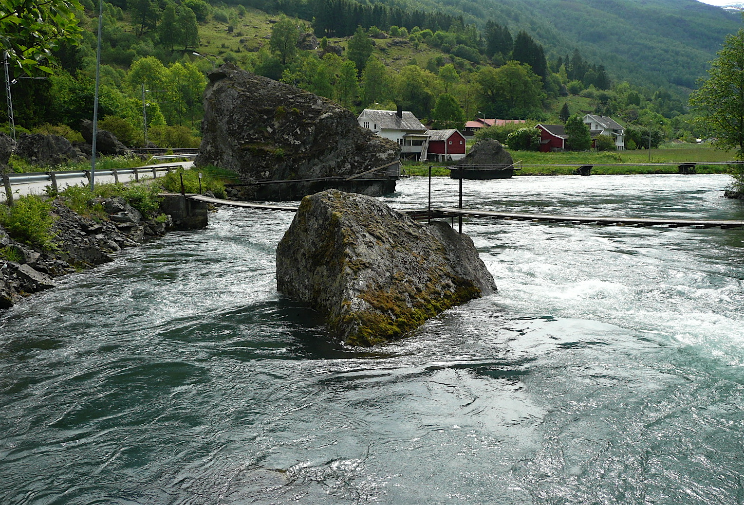 Fiskestenar